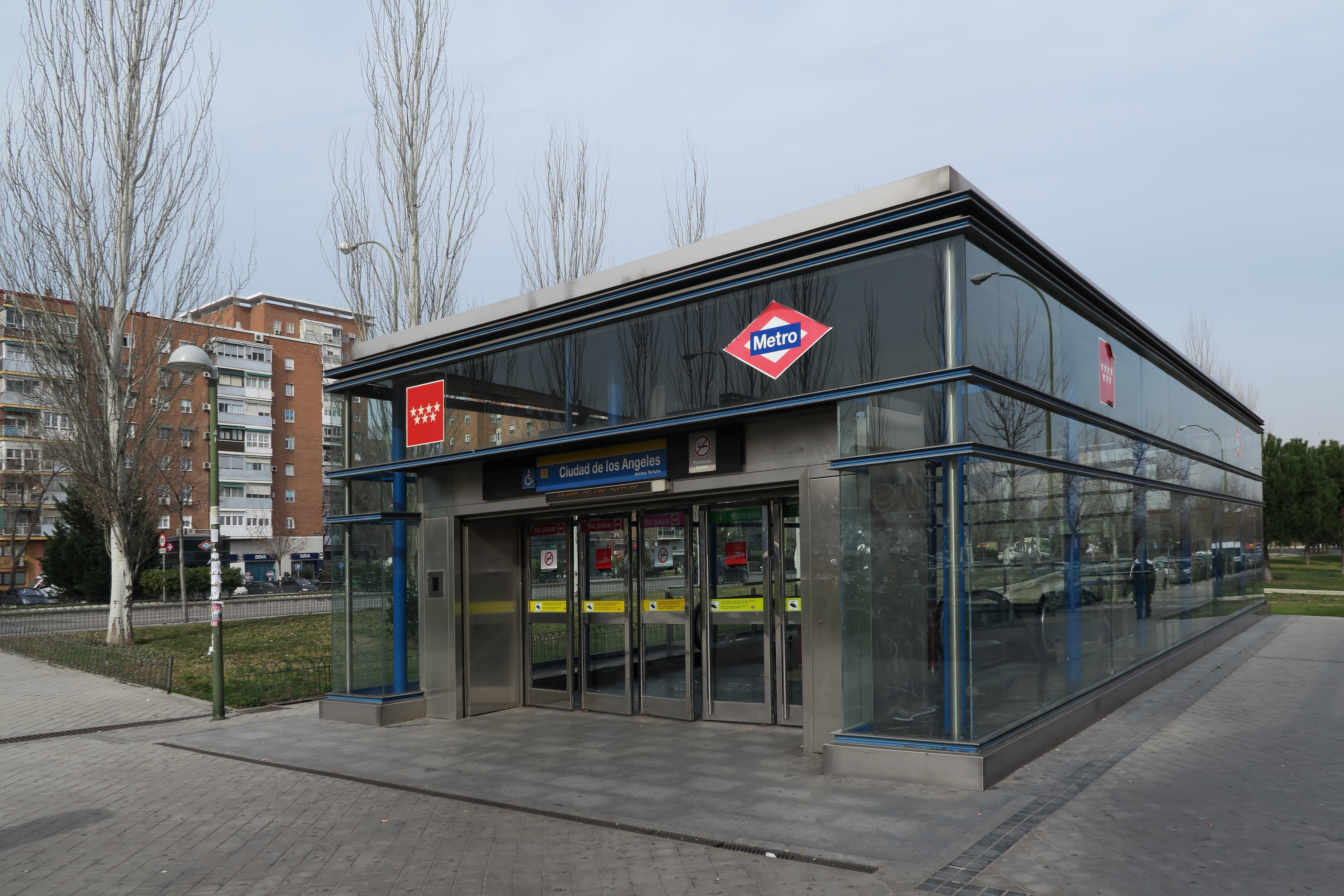 Entrada estación de Ciudad de los Ángeles